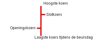 Zelf gemaakt in MS Photo Draw